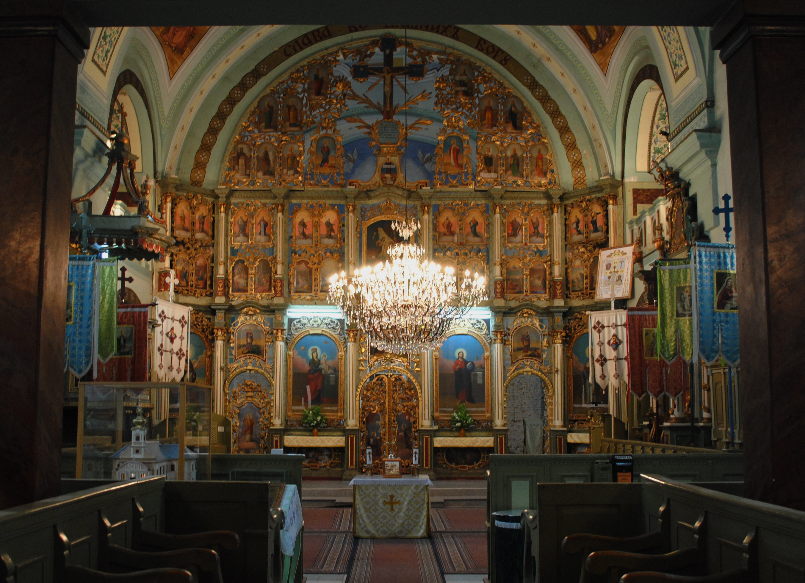 Unutrasnjost Grkokatolicke crkve u Ruskom Krsturu